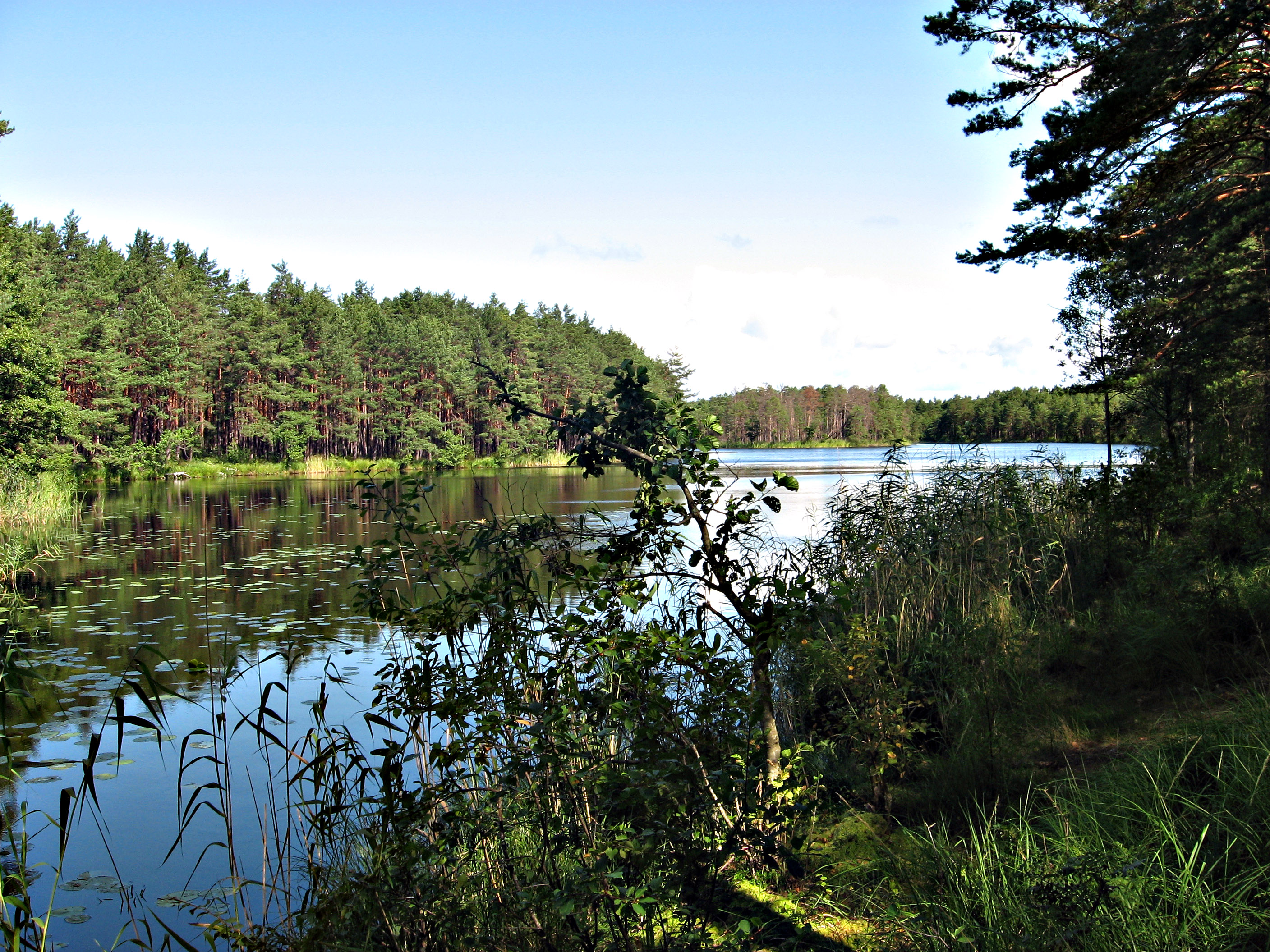 Lilastes iela 16, Lilaste, Carnikavas novads, LV-2163, Latvia